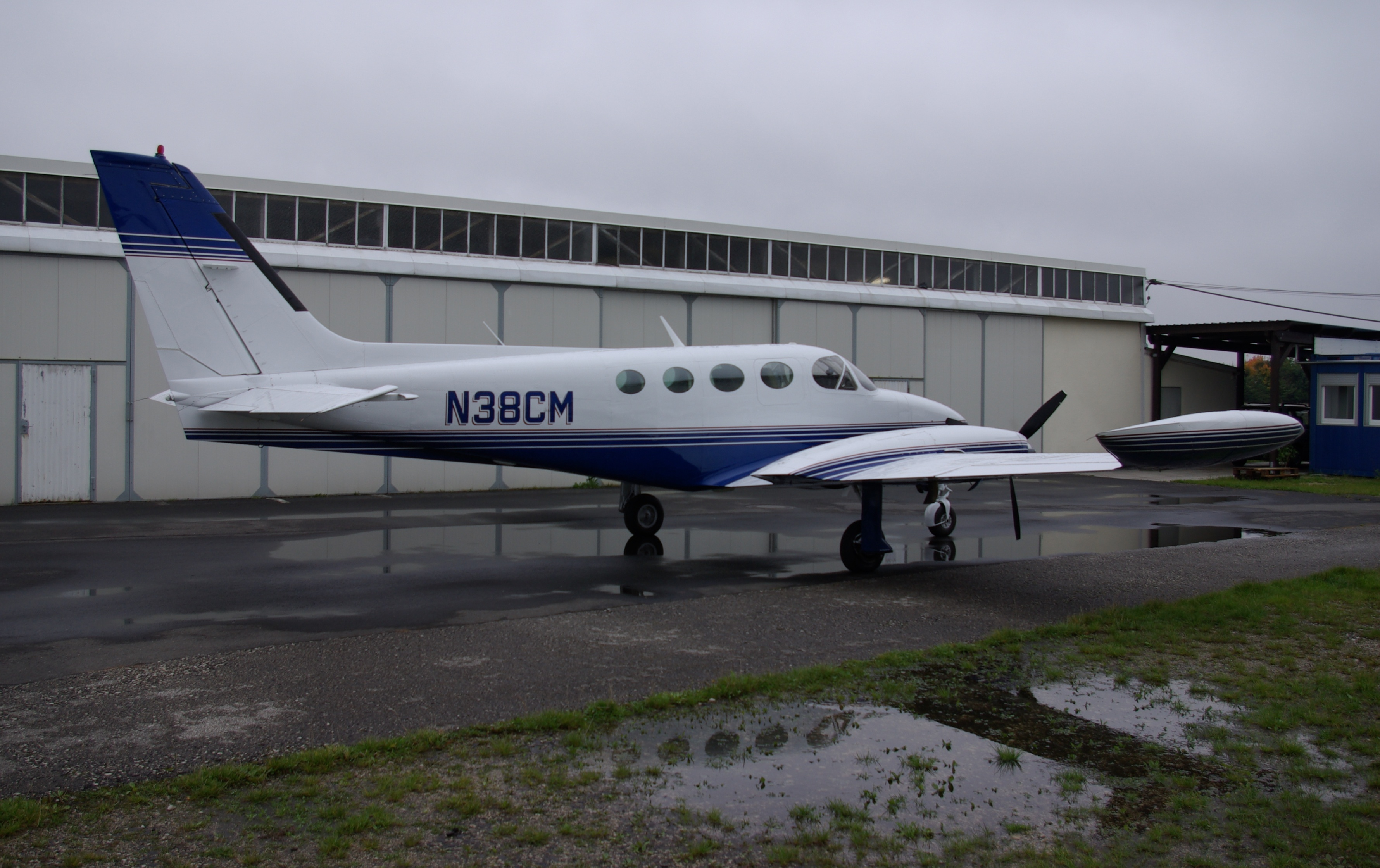 Flugplatz Herzogenaurach